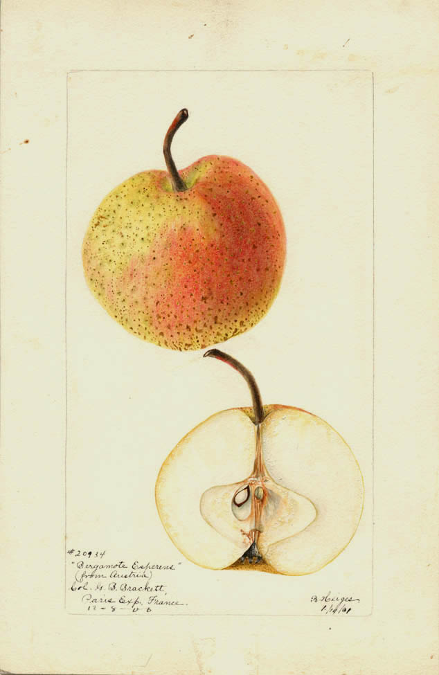 Bergamote.esperens